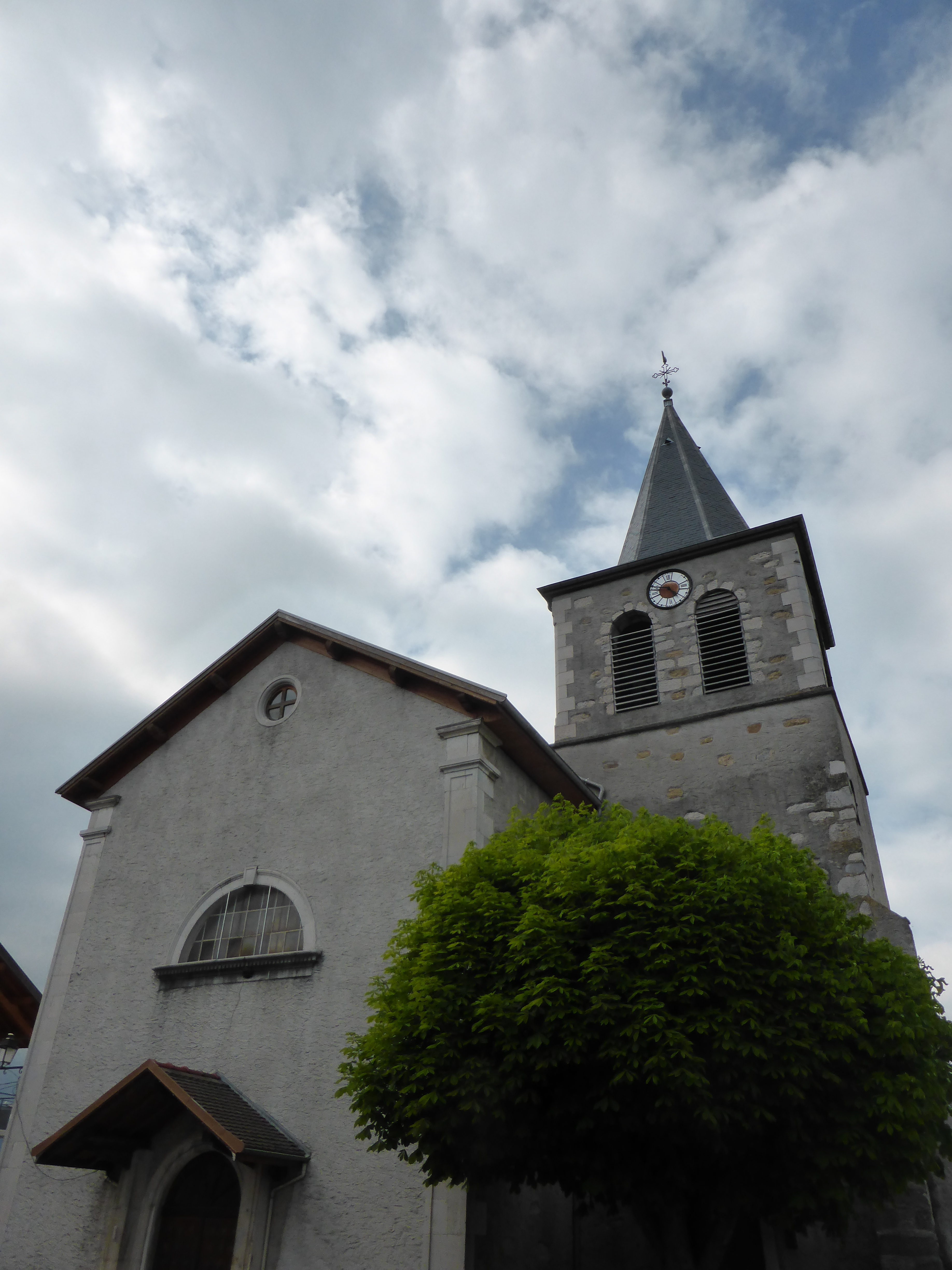 Église de Valleiry, en Haute-Savoie, France.